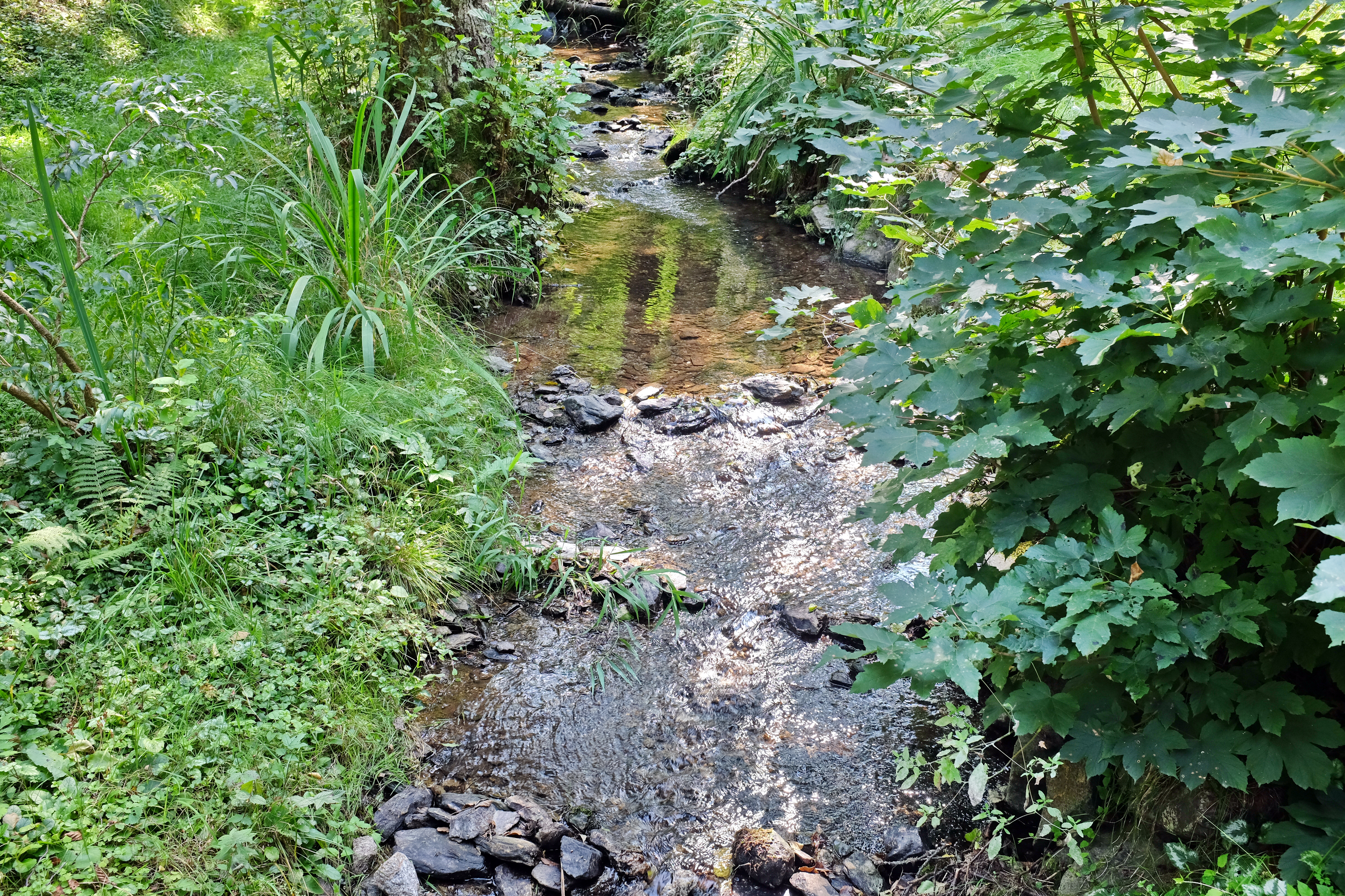 Sněženský potok, přítok Svatavy v Krušných horách, okres Sokolov